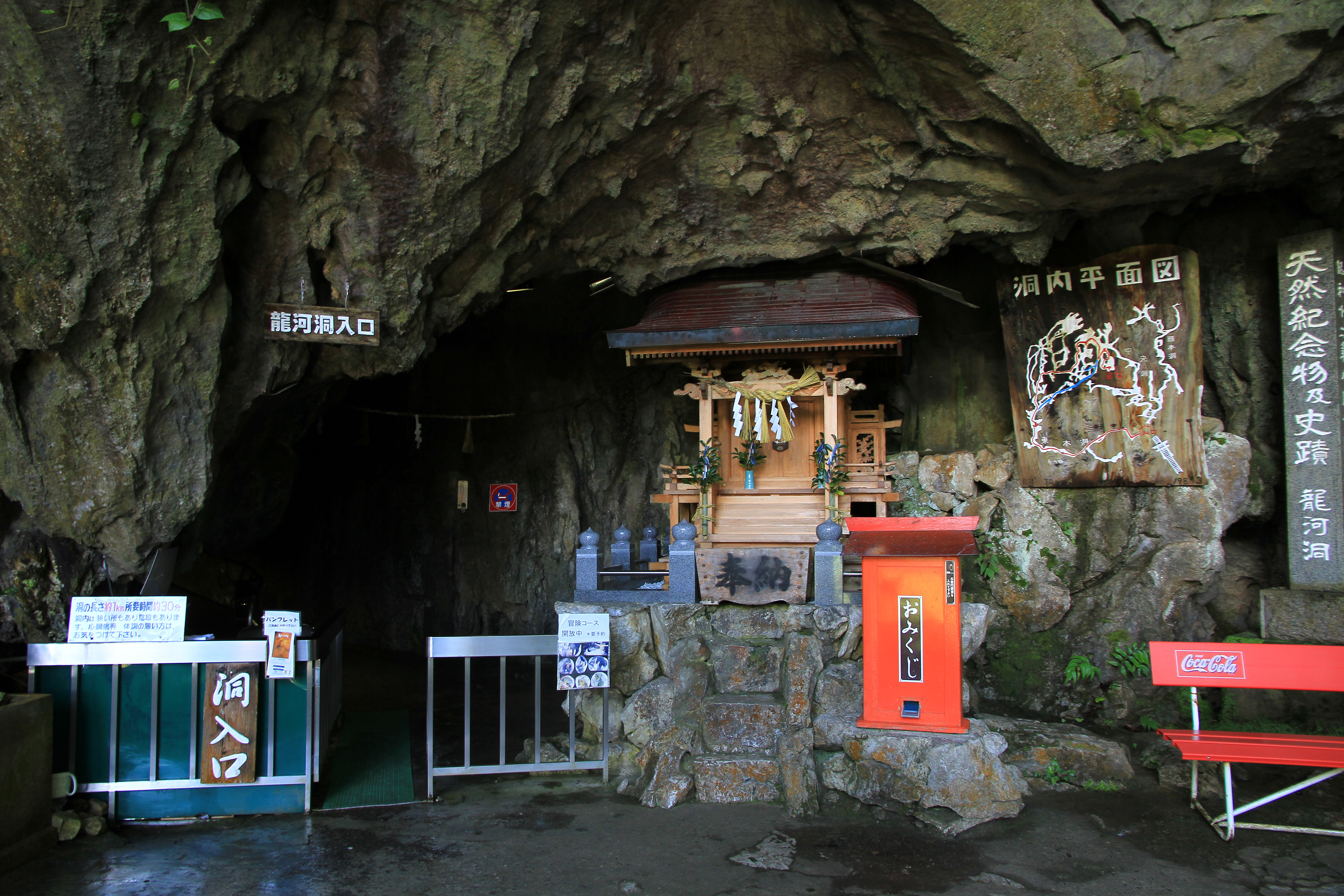 Ryuga Caves, Kami, Kochi, Japan